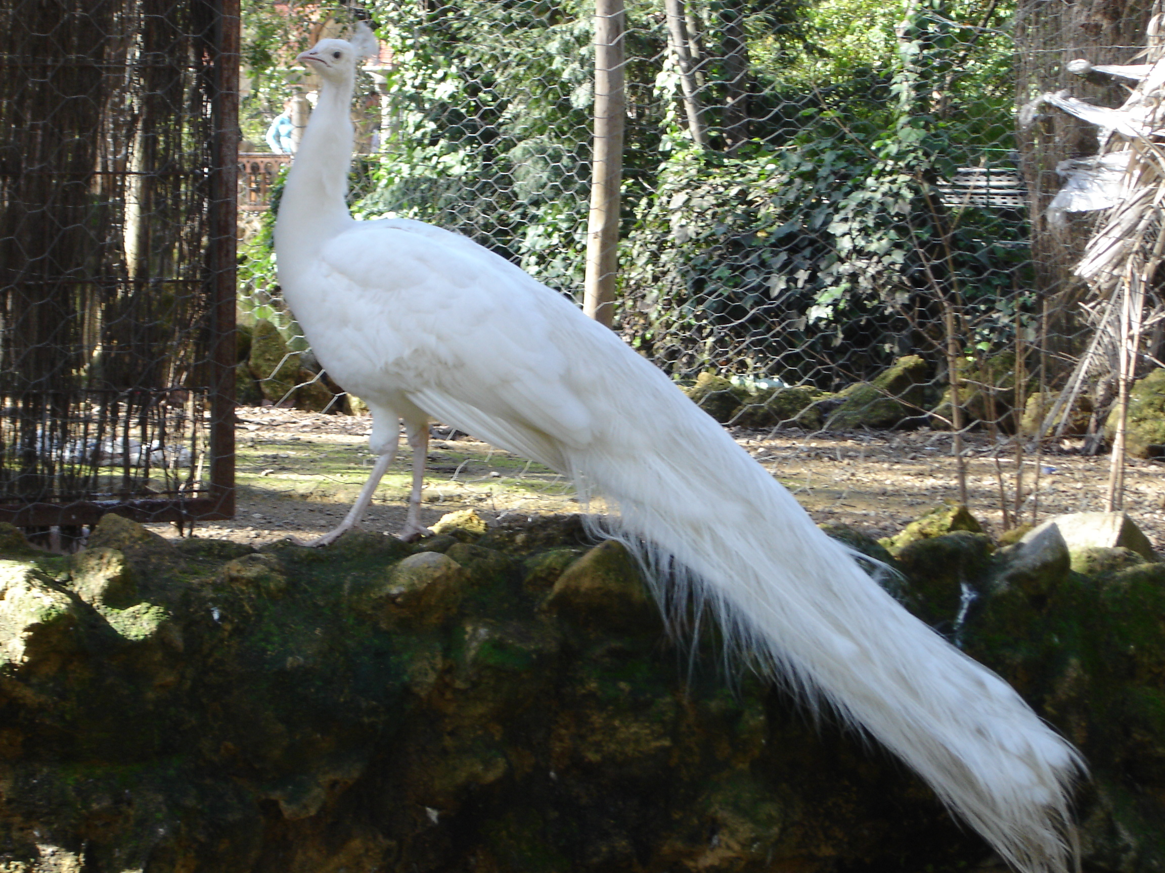 Pavo Real en el Parque de María Luisa (Sevilla). Realización propia.